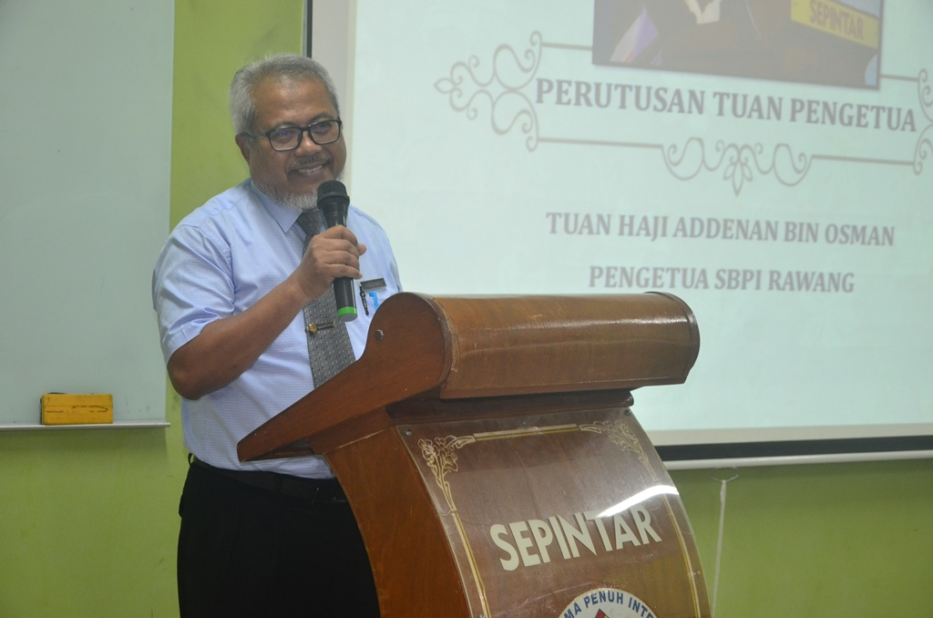 Tn. Hj. Addenan